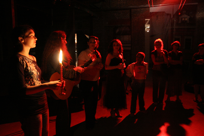 Havdala in the Galicia Jewish Museum during the Jewish Culture Festival in Krakow